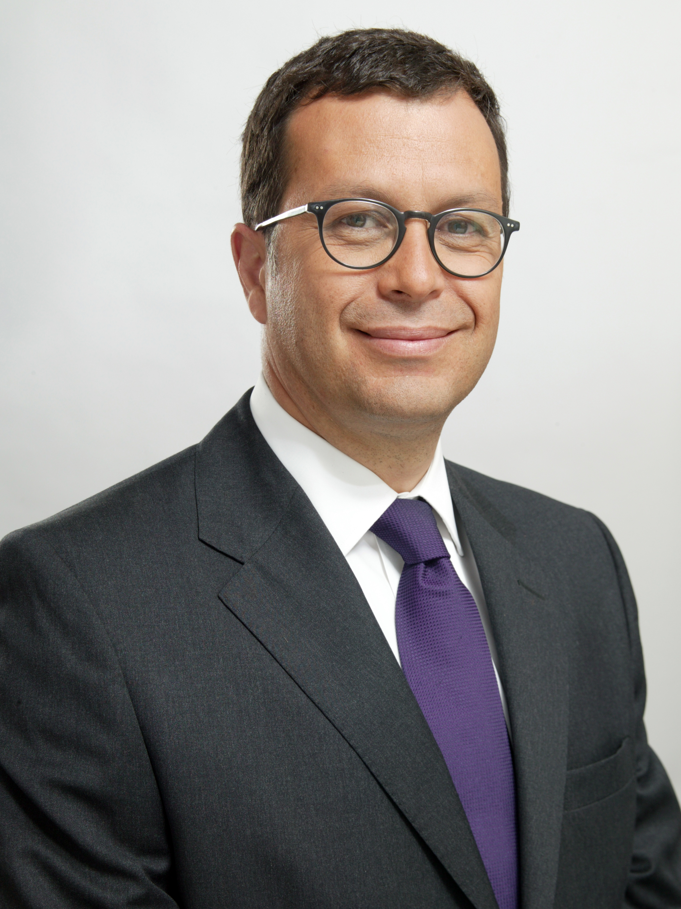 Rodrigo Hinzpeter, abogado y ministro del Interior de Chile (2010-21012) y Ministro de Defensa (2012- )